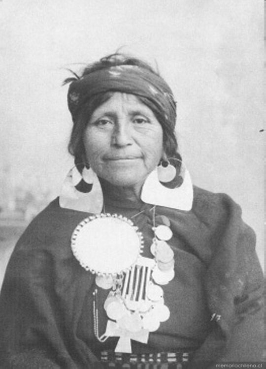 Mujer mapuche con joyas de plata, ca. 1890